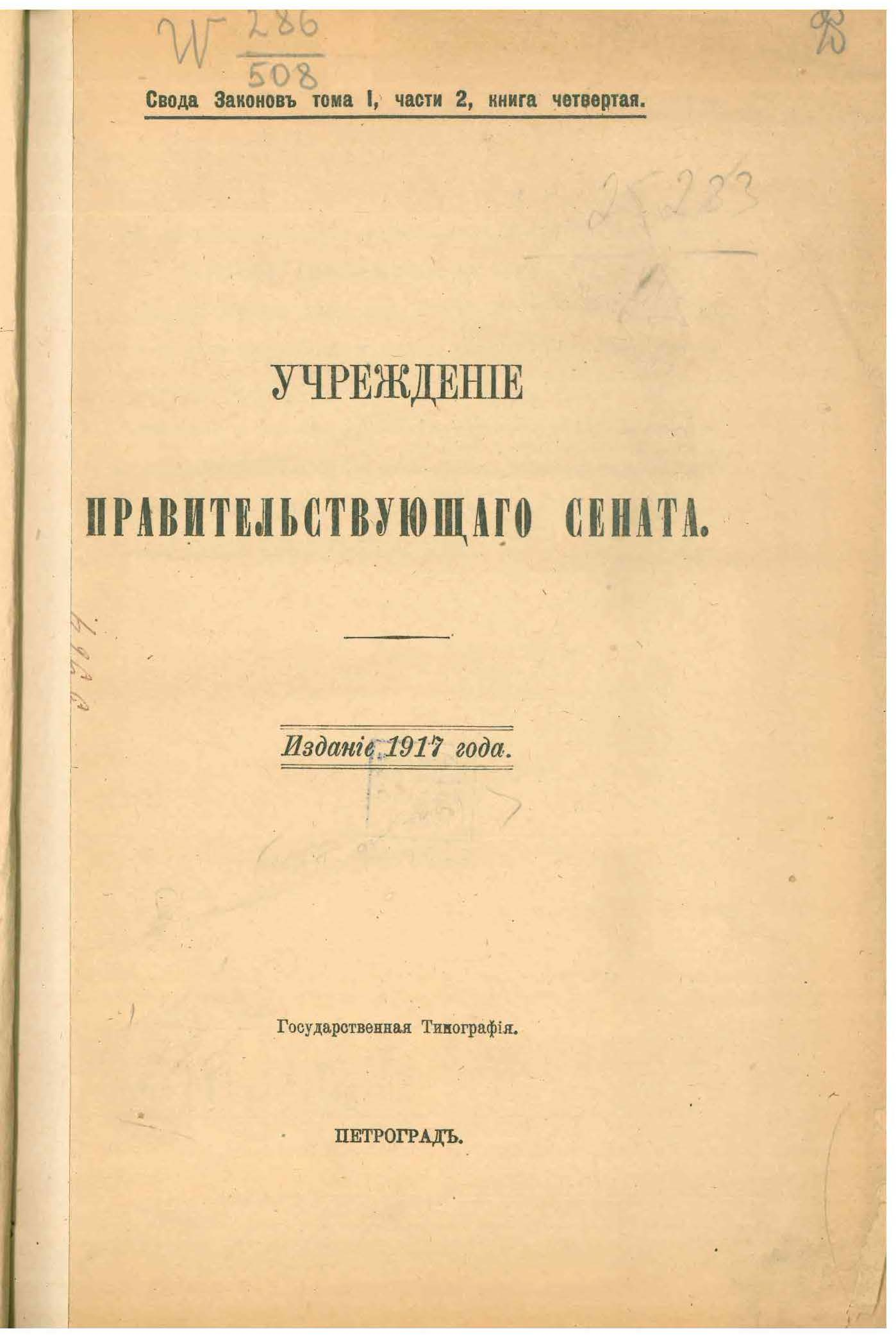 Учреждение Правительствующего сената